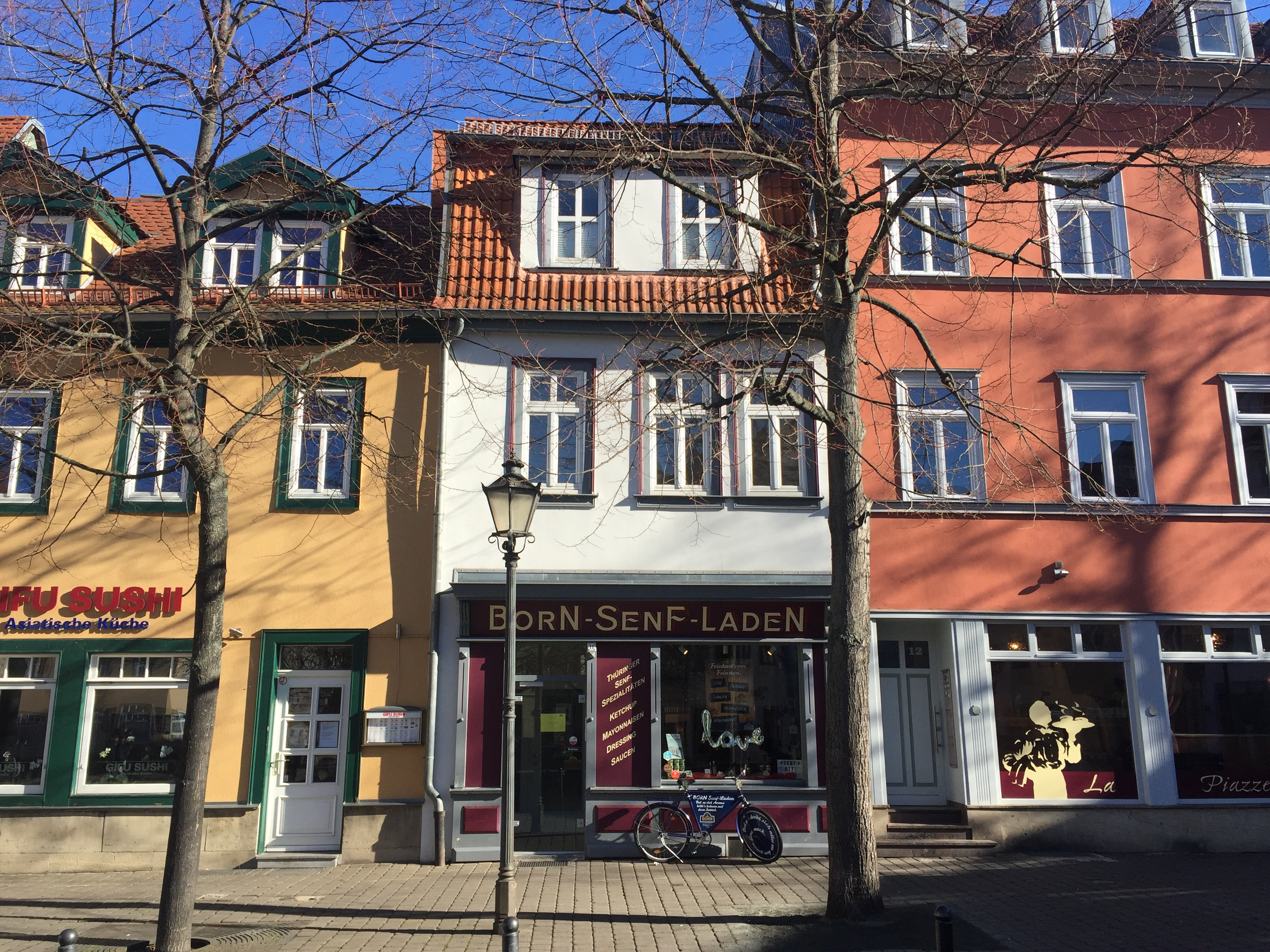 BORN Senf-Laden Wenigemarkt 11 99084 Erfurt